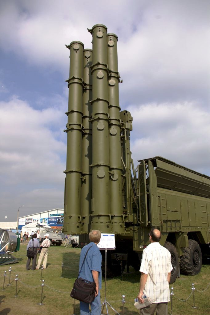 3M-54 Klub missile launch tubes based on a MZKT-7930 truck.